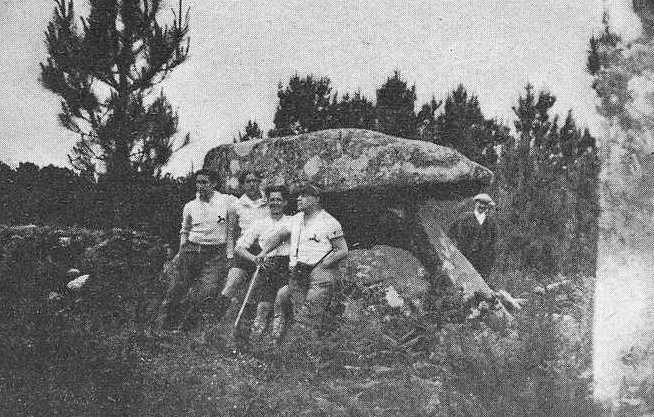 Álvaro María de las Casas e os Ultreyas visitando o dólmen de Oleiros, fotografía en Vida Gallega 1933